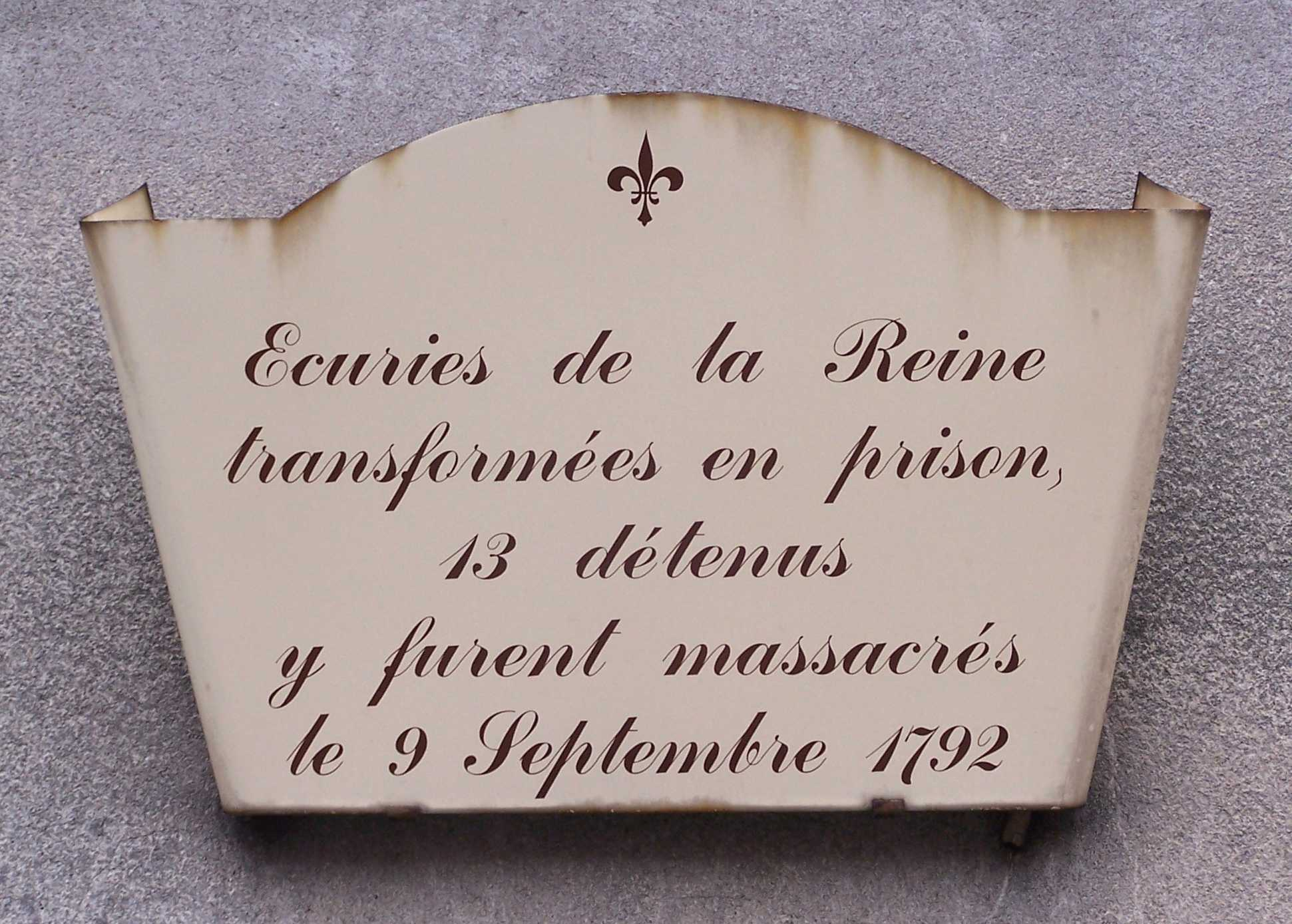 Panneau d'information sur les Écuries de la Reine, rue Carnot à Versailles (Yvelines, France)